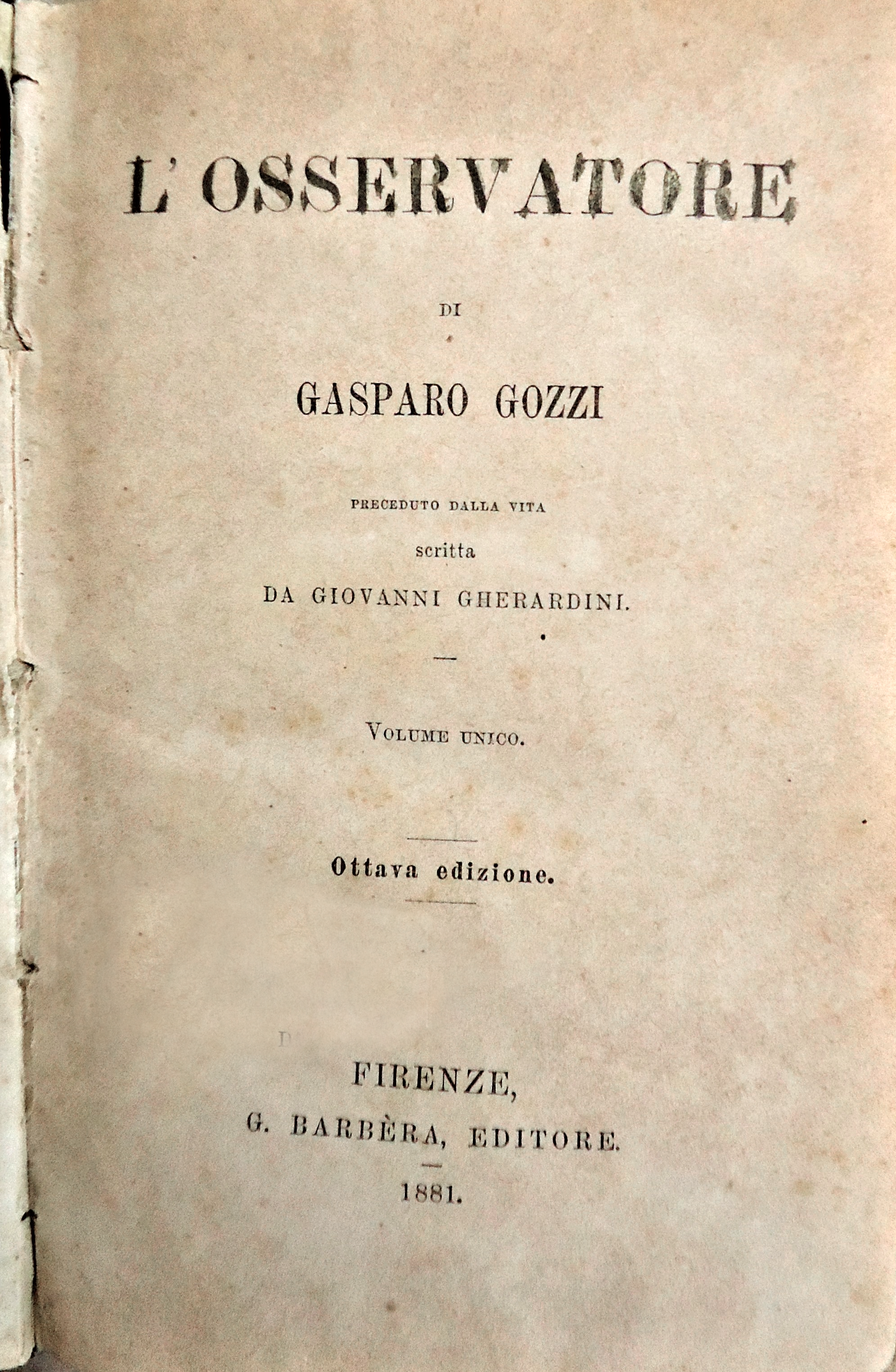 Con biografia di Gasparo Gozzi scritta da Giovanni Gherardini.